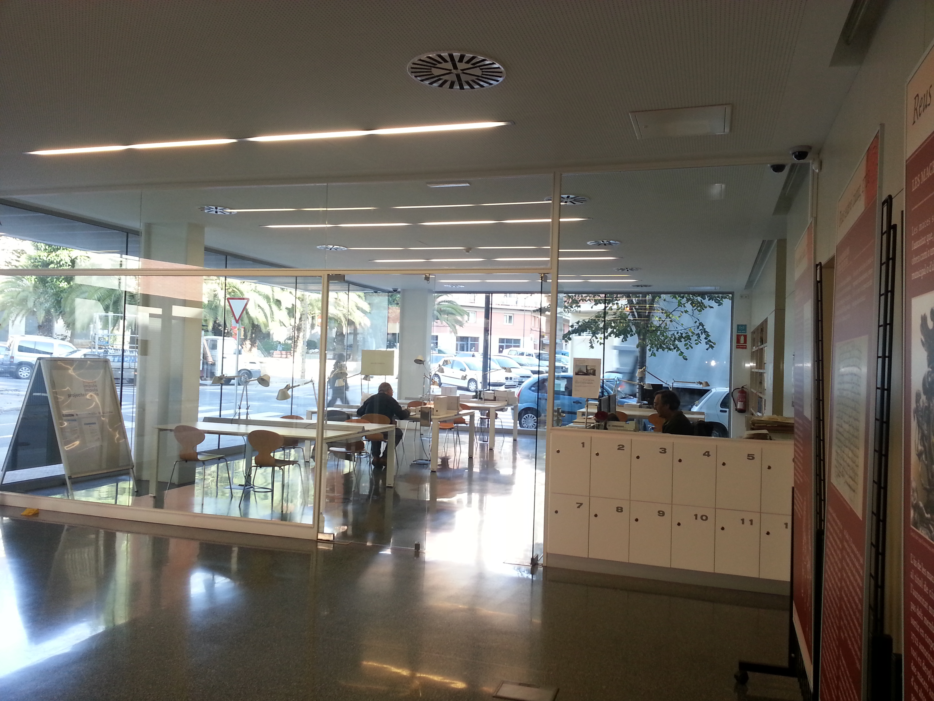 Vista parcial del vestíbul de l'Arxiu Municipal de Reus amb la Sala de consultes al fons.